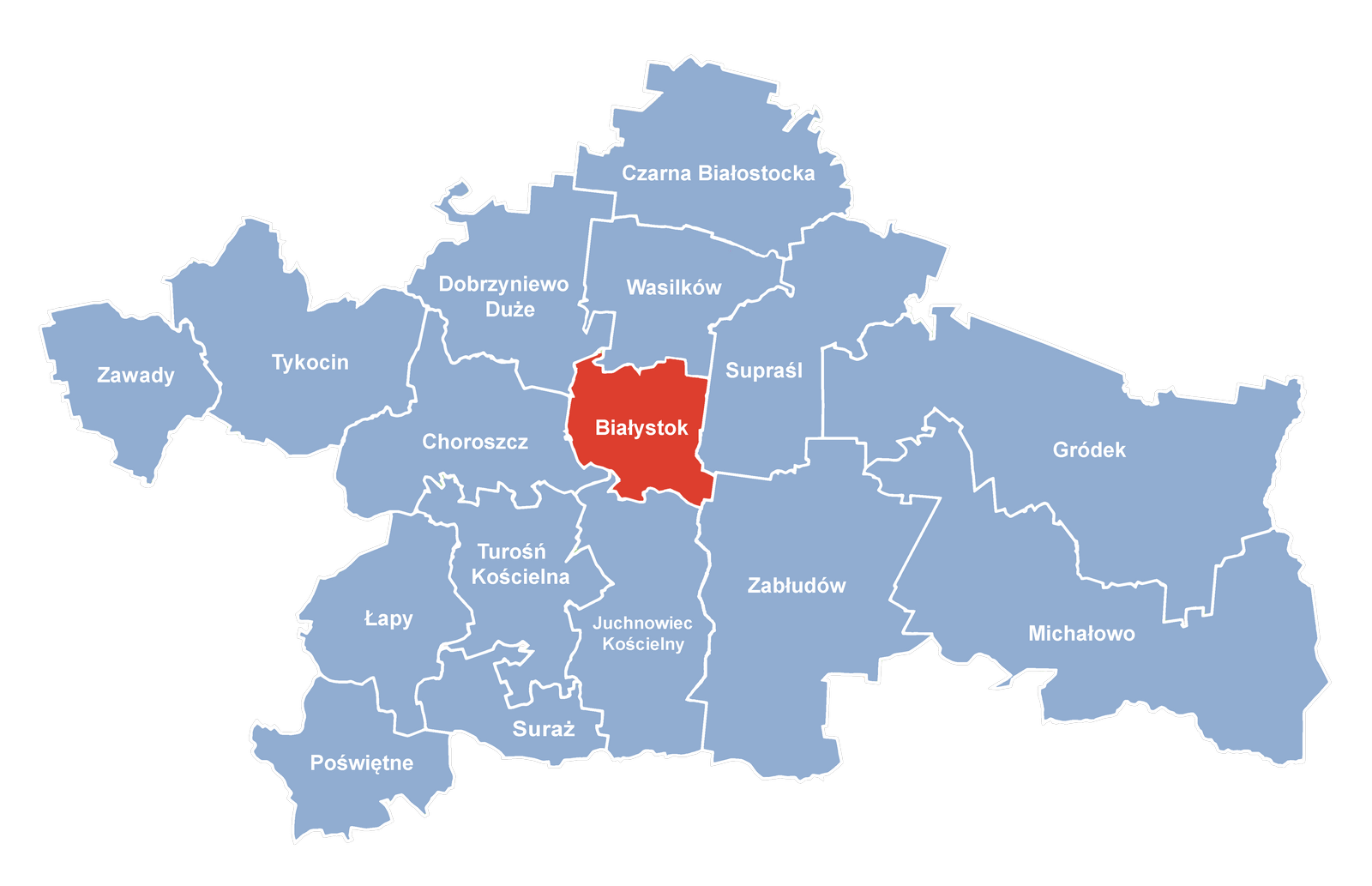 Podział na gminy w powiecie białostockim, województwo podlaskie (na podstawie danych z